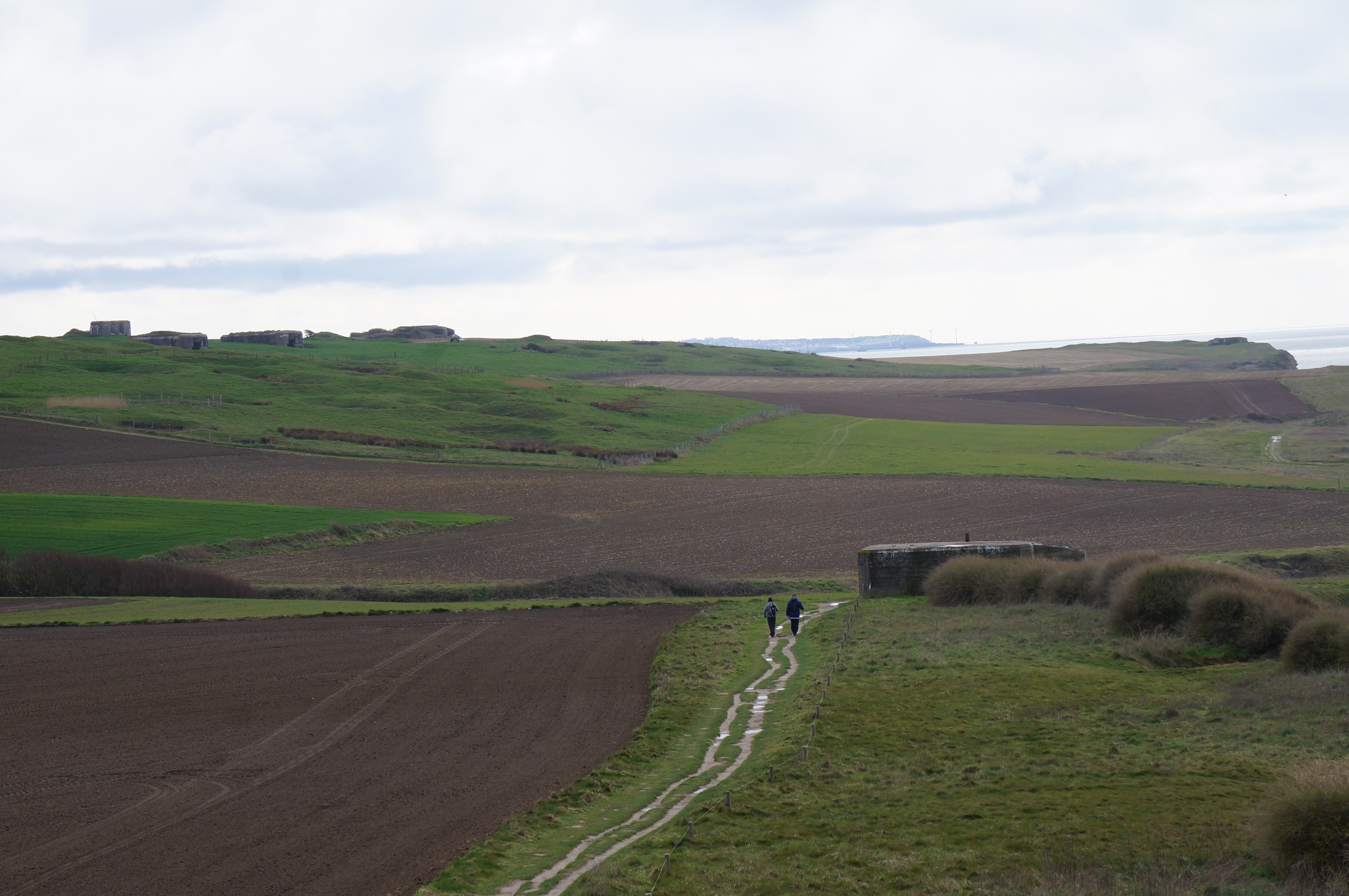 Cap Gris-Nez - élément de la batterie Todt Audinghen, Pas-de-Calais, Hauts-de-France, France.